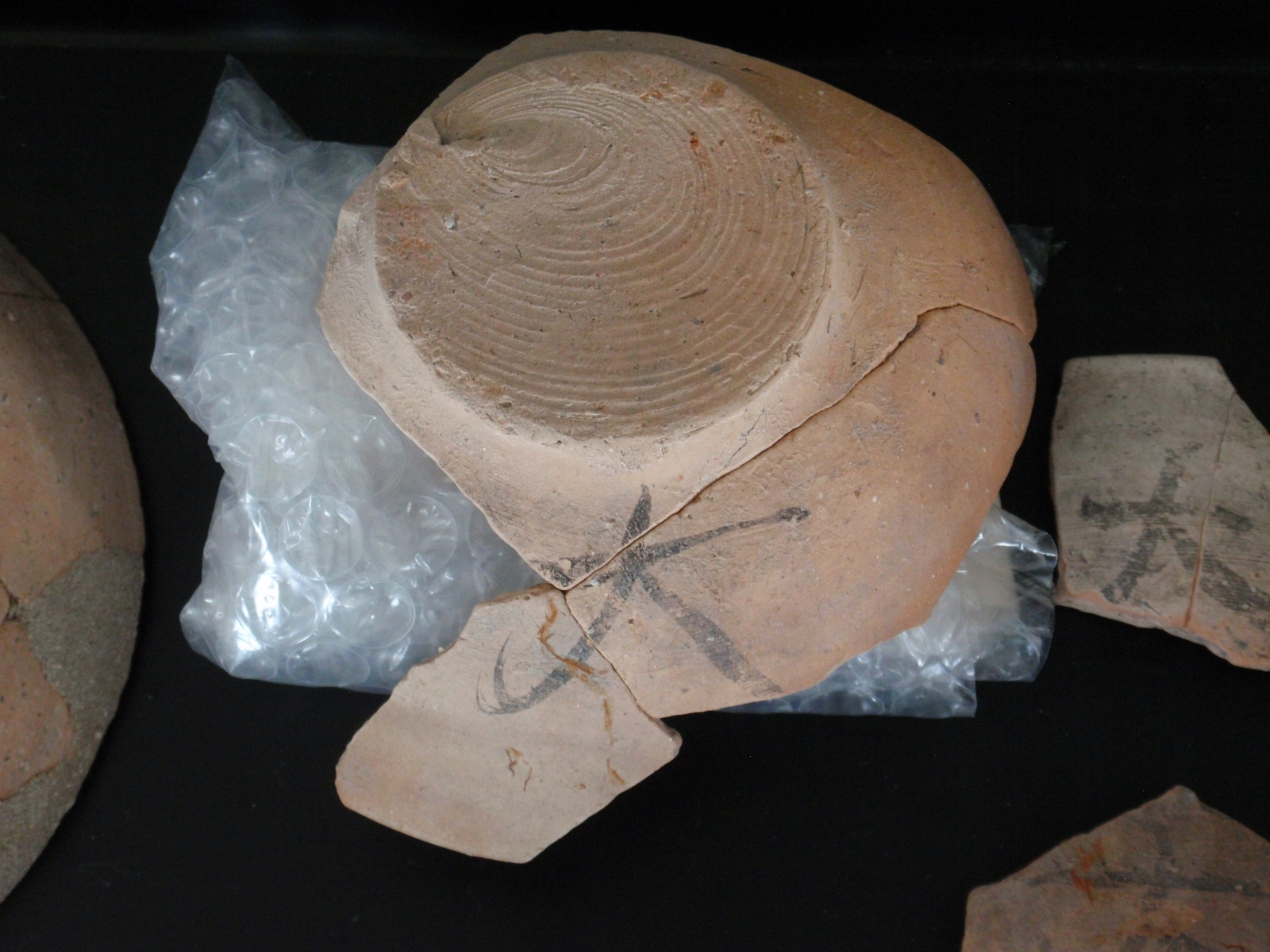 半在家遺跡から出土した墨書土器。